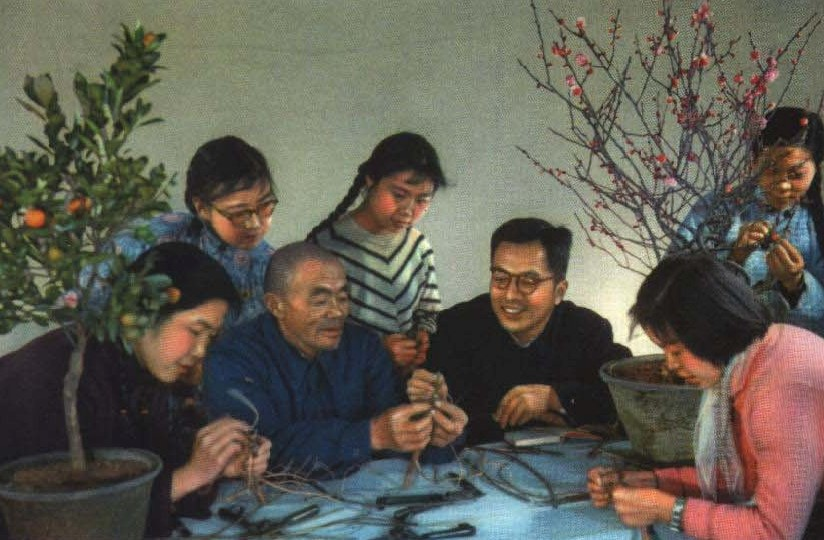 1964-03 1964年 花卉嫁接